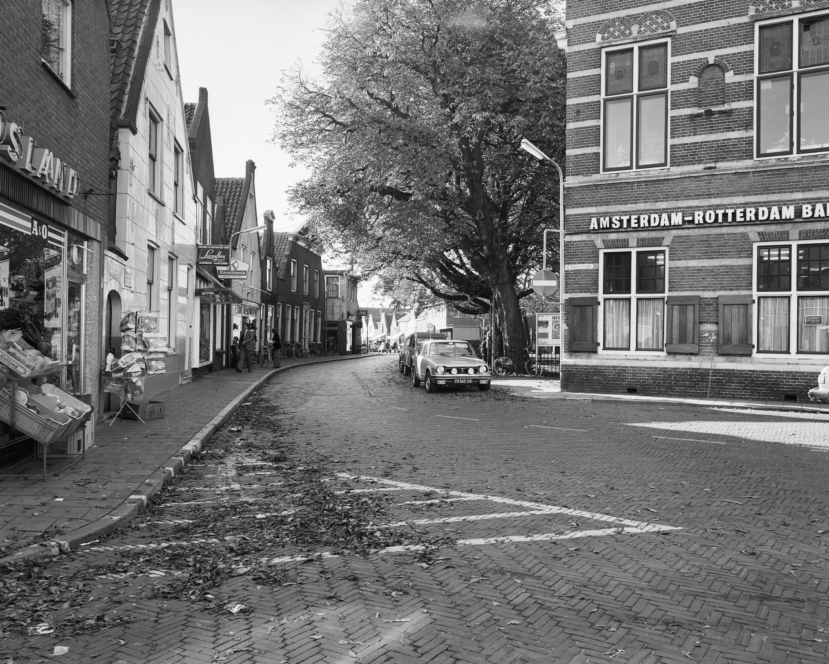 overzicht